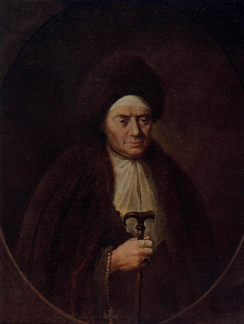 Xenia Shestova († 1631)label QS:Len,"Xenia Shestova († 1631)"label QS:Lru,"Неизвестный художник. Портрет инокини Марфы (Ксения Ивановна Шестова)."